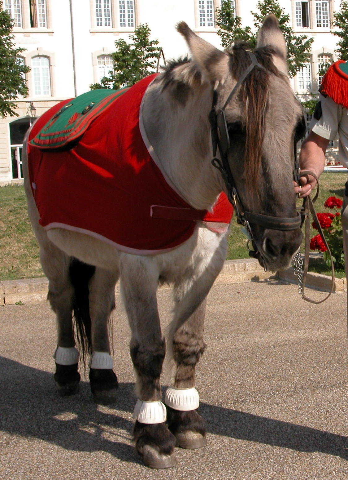 De afgebeelde Tapanar is feitelijk de tweede of derde die het 2de regiment infanterie als mascotte aanschafte. Het idee om een ezel als macotte te voeren kwam van kolonol francoise in 1985. De eerste heeft echter geen lang leven gekend in het korps. De bewakers van de gevangenis hadden de ezel geleerd om zelfstandig een fles bier leeg te drinken. Wat er toe leidde dat het dier wel eens beschonken werd aangetroffen. Op zijn laatste avond werd hij door de verzorger te kort aangebonden. Hierdoor kon hij niet gaan liggen, wat in combinatie met wat alcoholgebruik een dodelijke combinatie bleek. Op het appel werd geld ingezameld voor de aanschaf voor de opvolger.